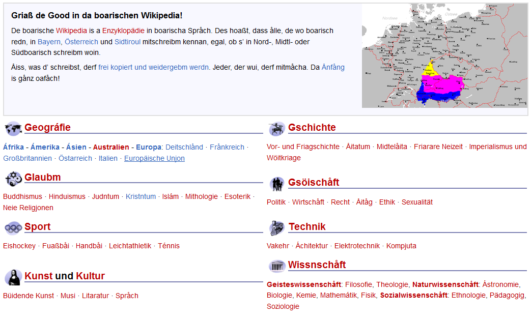 Screenshot der Startseite der bairischen Wikipedia von 2006